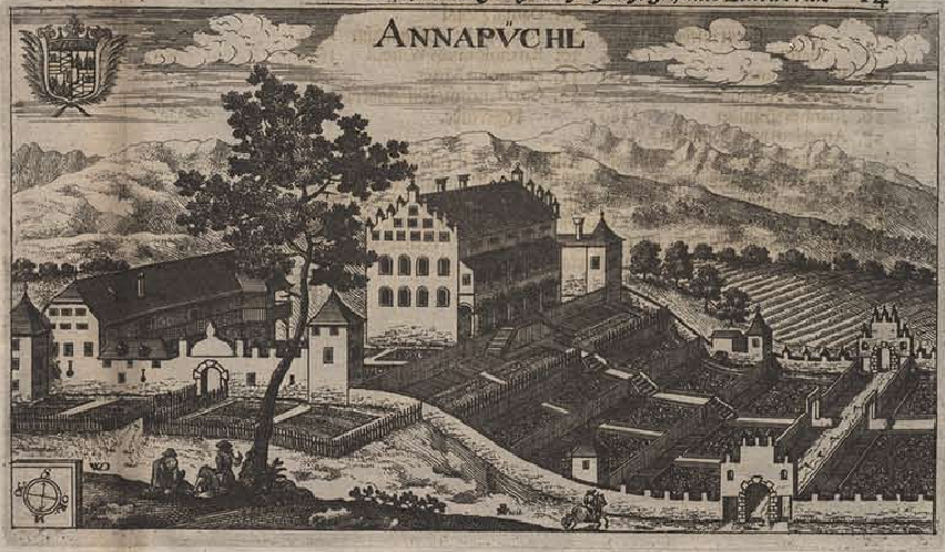 Digitalisierung: Seiten 13&14: Ansicht Arnoldsteins und Anabichls